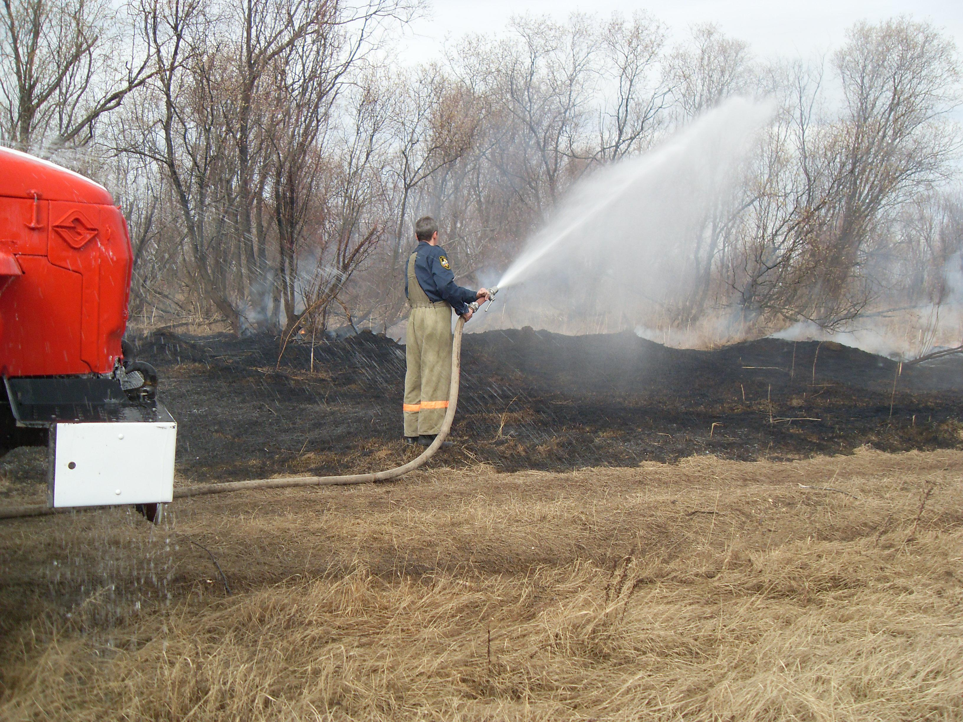 Тушение травы 3 мая 2009